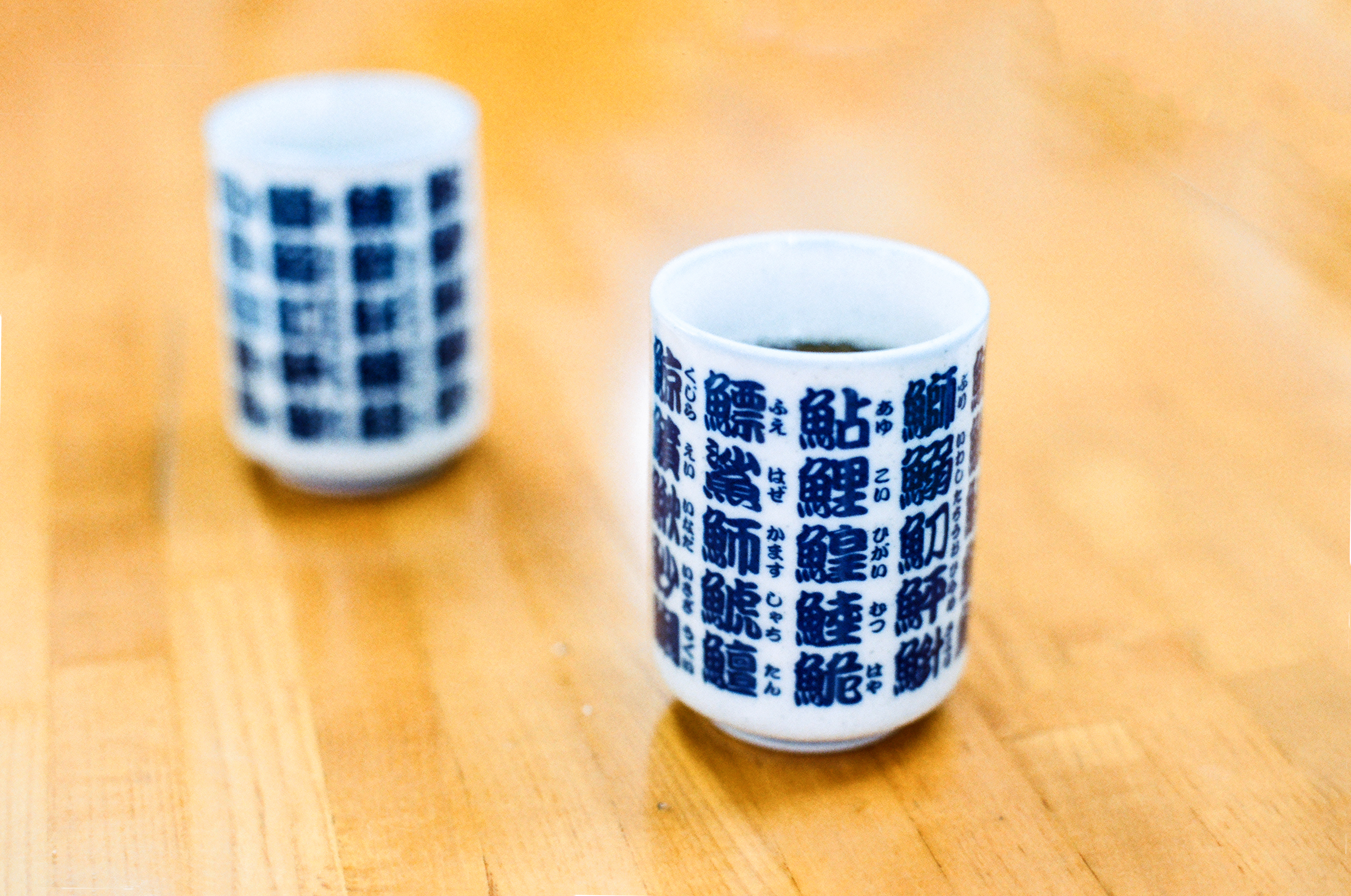 Olympus OM-10 + Zuiko Auto-S 50mm f/1.4 + Fujiflim 業務用 100